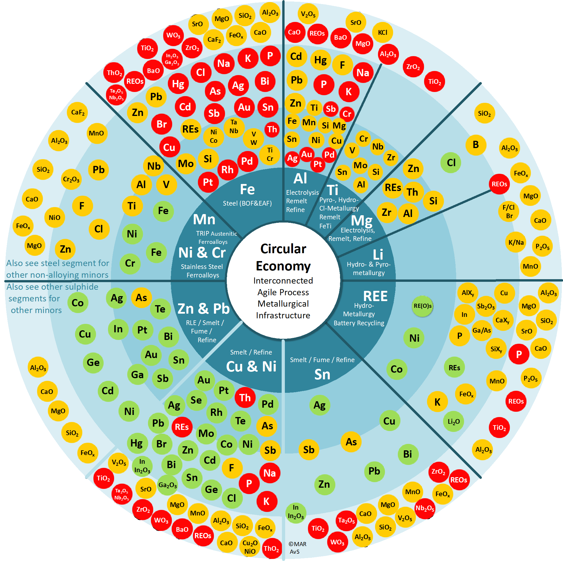 Das Metallrad (Metal Wheel) ordnet die Elemente im Periodensystem in Sparten